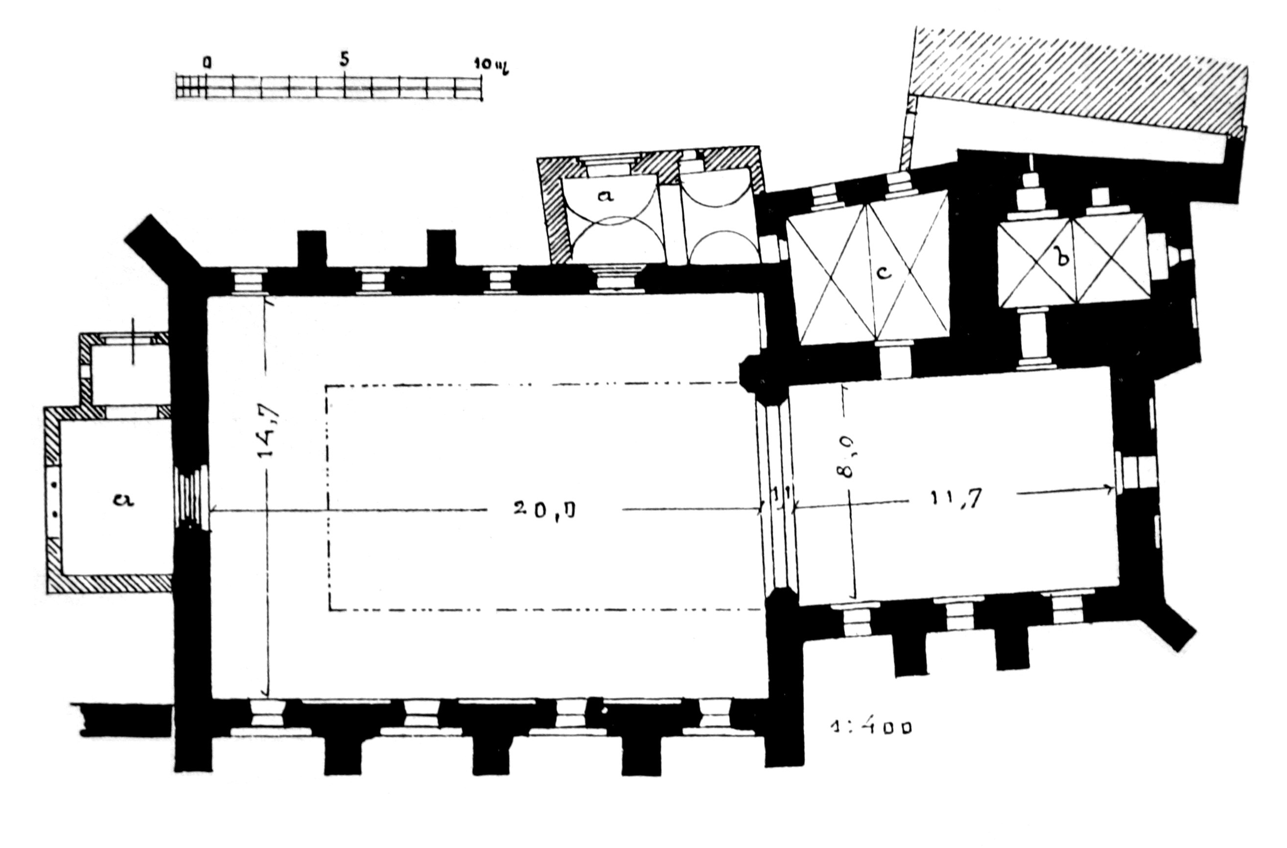 Plan kościoła Przemienienia Pańskiego w Iławie, wg Johann Heise, Die Bau- und Kunstdenkmäler des Kreises Marienwerder östlich der Weichsel (Die Bau- und Kunstdenkmäler der Provinz Westpreußen 11), Danzig 1898